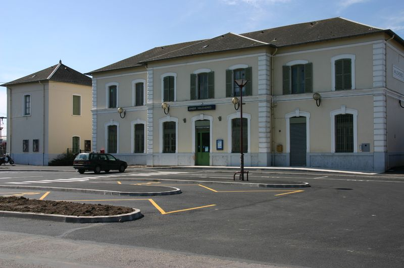 Gare de Malesherbes. Le batiment de la gare.